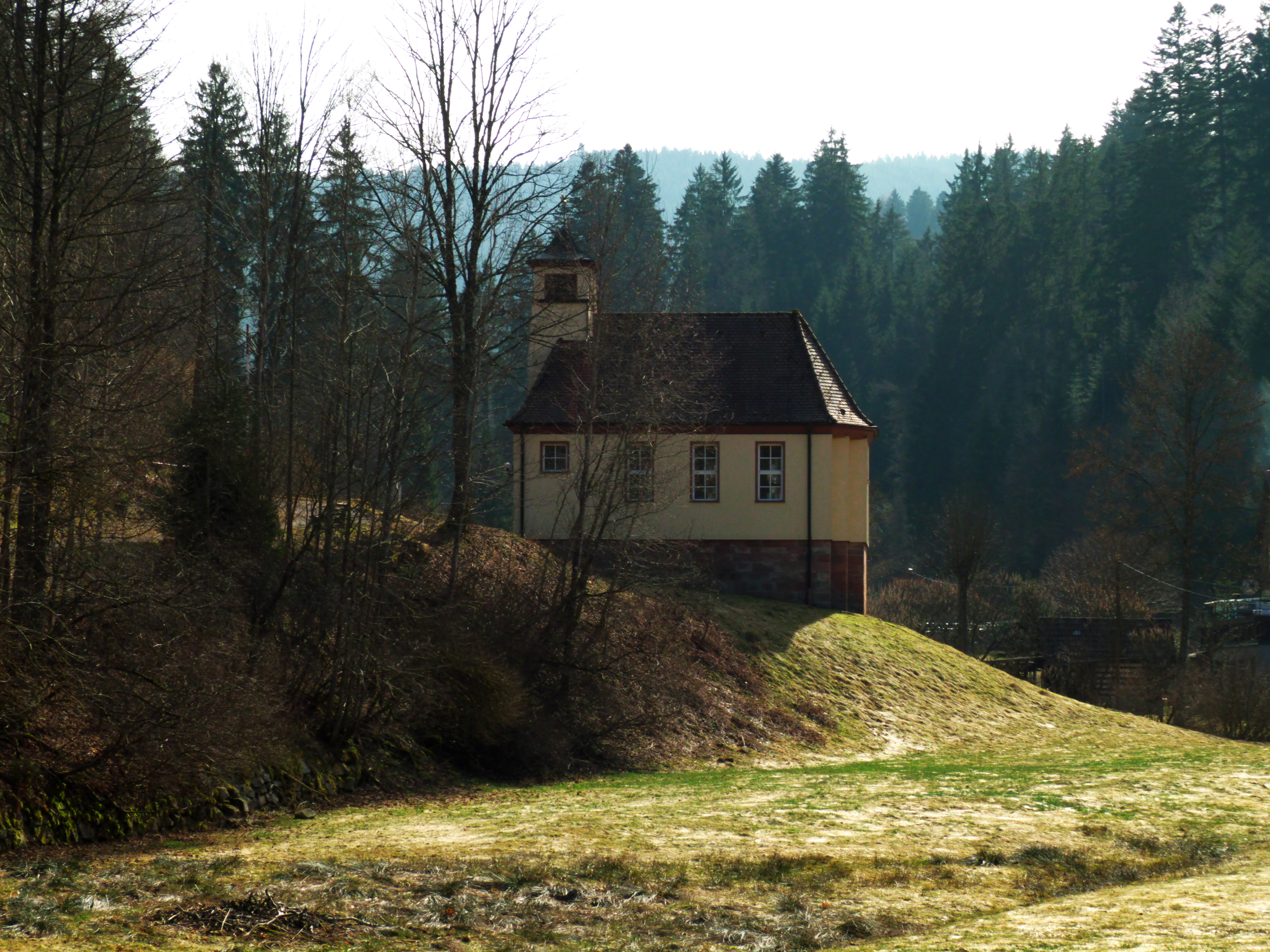 Church Of Zwickgabel